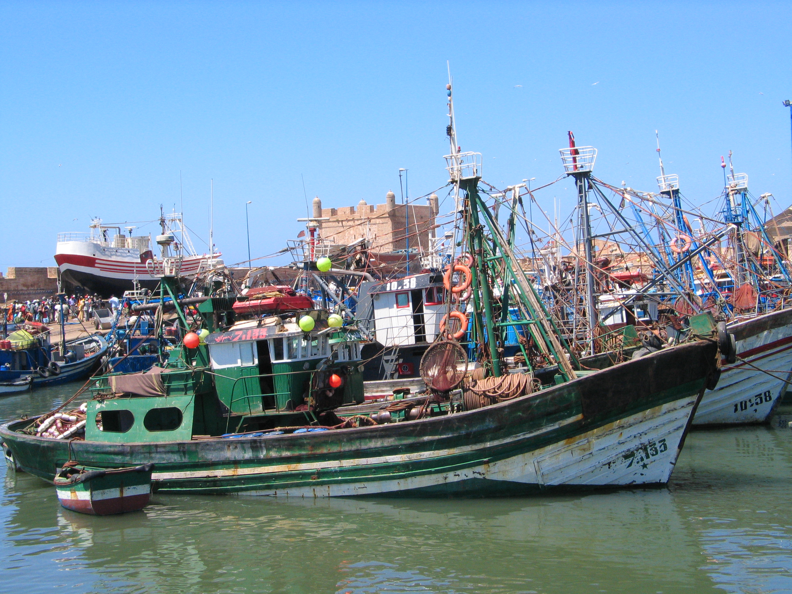 Essaouira (Maroc), le port, les bateaux de pêche